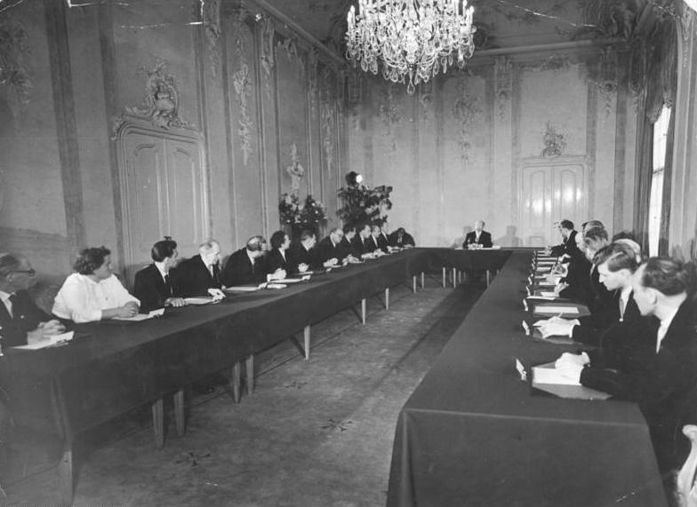 Zentralbild/ Heilig 12.9.1960 Berlin: Konstituierende Sitzung des Staatsrates der DDR., Am Nachmittag des 12. September trat der Staatsrat der Deutschen Demokratischen Republik unter Leitung des Vorsitzenden des Staatsrats, Genossen Walter Ulbricht, im Amtssitz des Staatsrates in Berlin-Niederschönhausen zu einer konstituierenden Sitzung zusammen. UBz: Während der konstituierenden Sitzung (Übersicht).